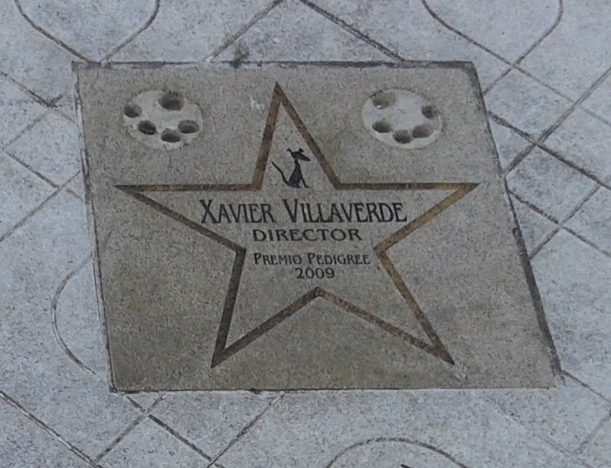 Premio pedigree 2009 outorgado ao director Xavier Villaverde.